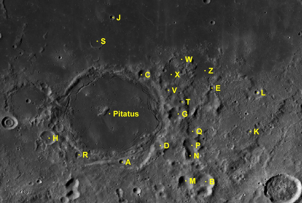 Cráter lunar Pitatus. Cráteres satélite. (Imagen LRO)